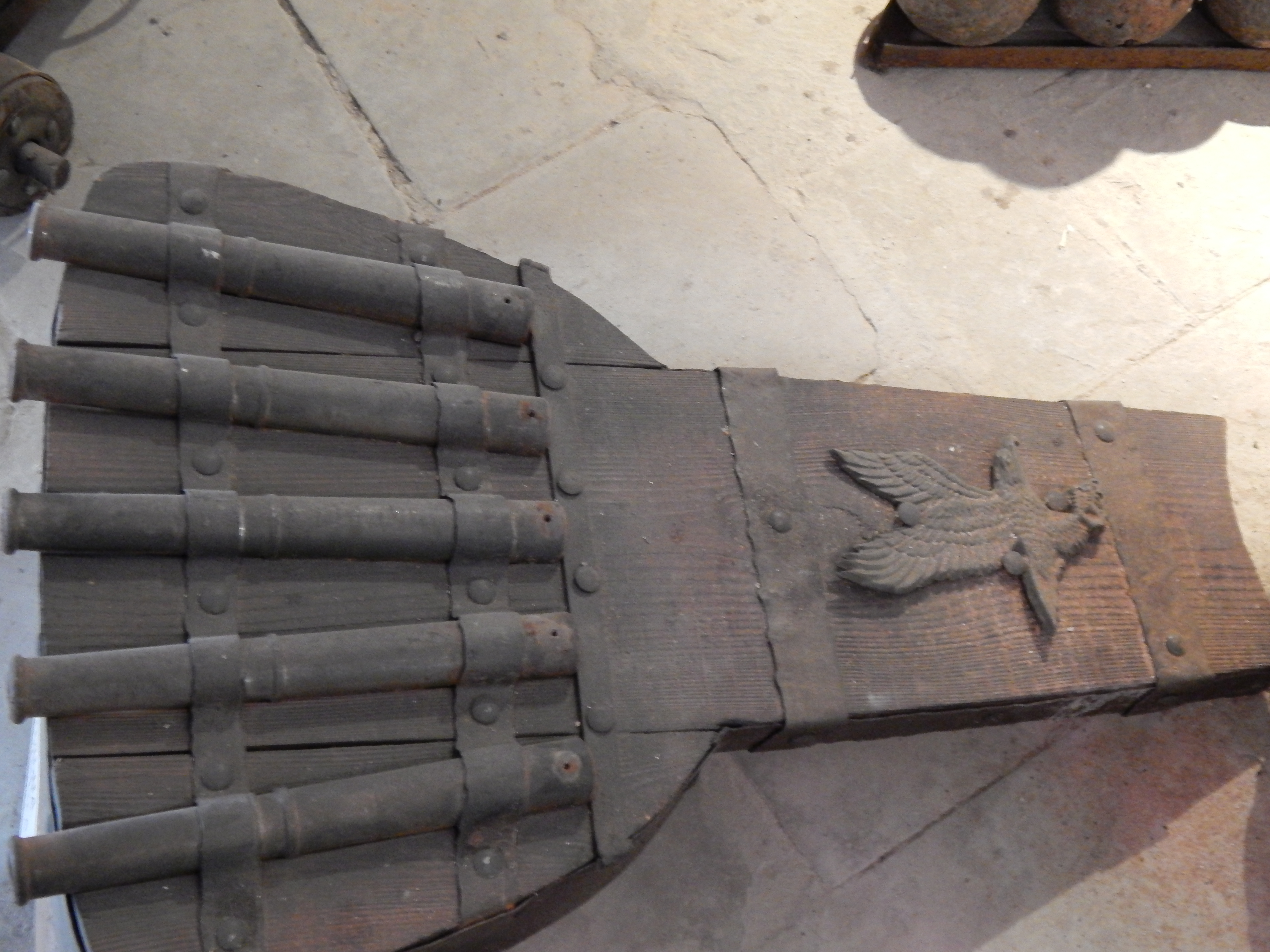 Хотинська фортеця, м. Хотин, Державний історико-архітектурний заповідник «Хотинська фортеця»